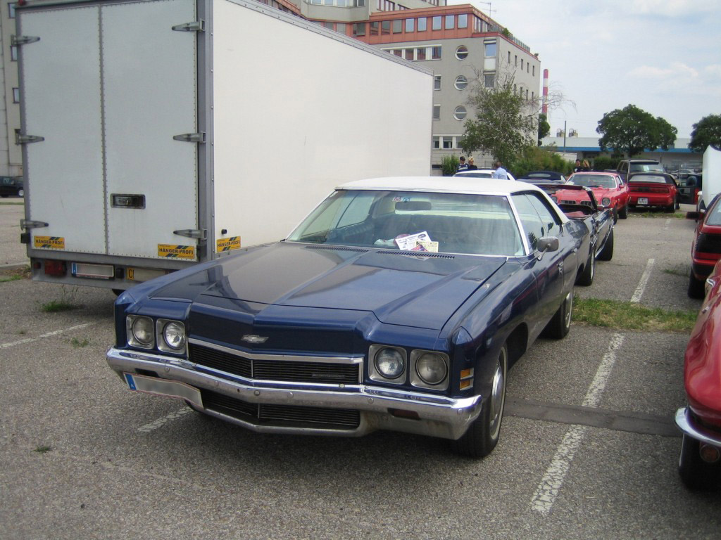 1972 Chevrolet Impala V8 Big-Block 6.6l (350cui)